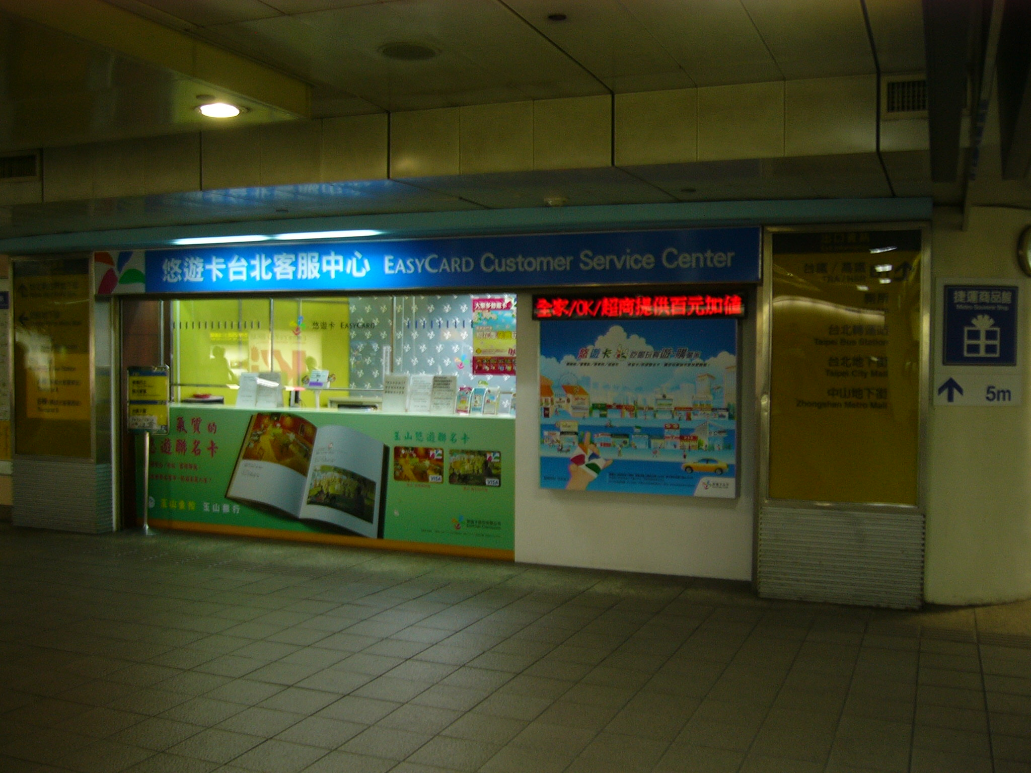 位於台北車站地下一樓的悠遊卡台北客服中心